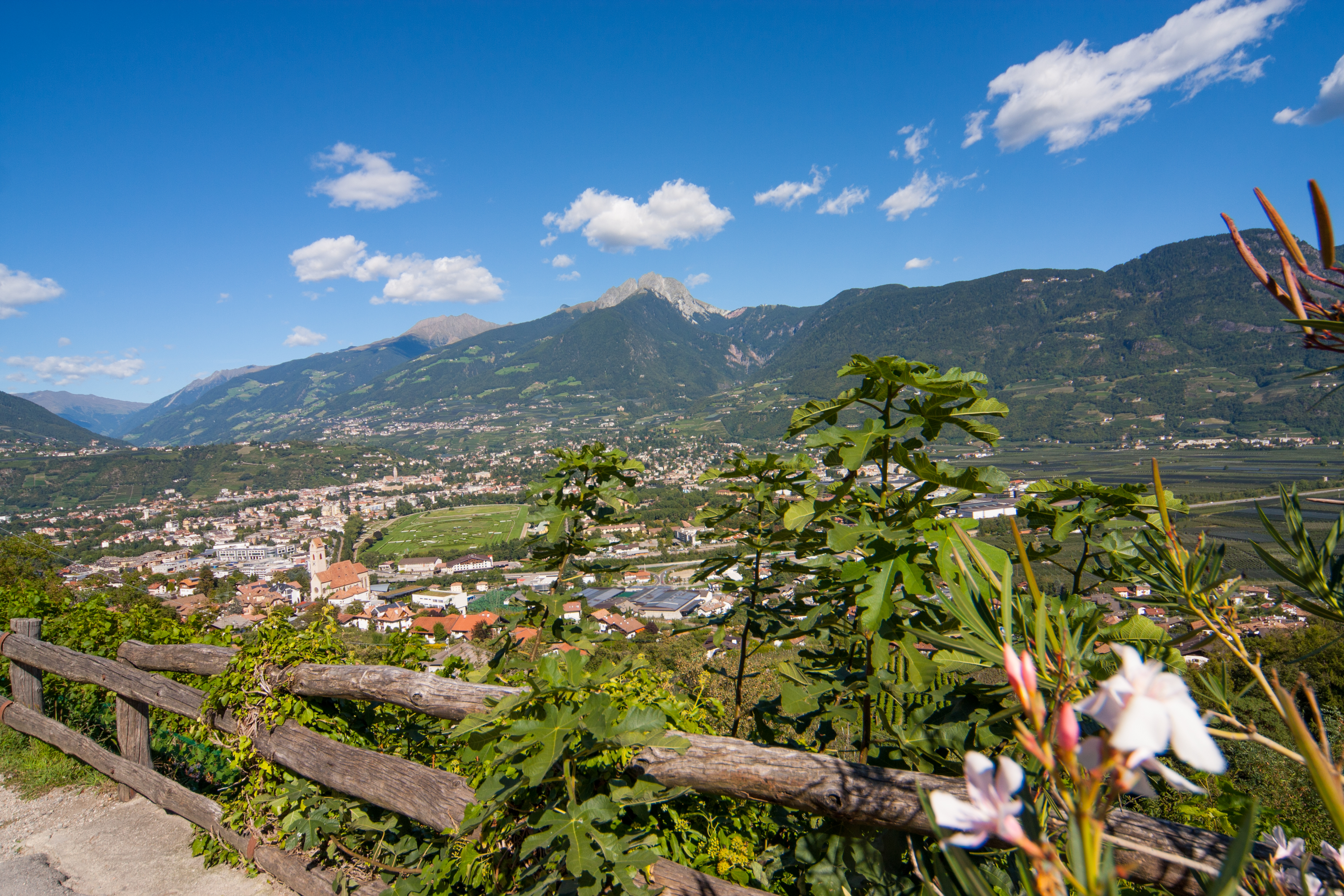 Marling ist nur 3 Kilometer von der Kurstadt Meran entfernt.